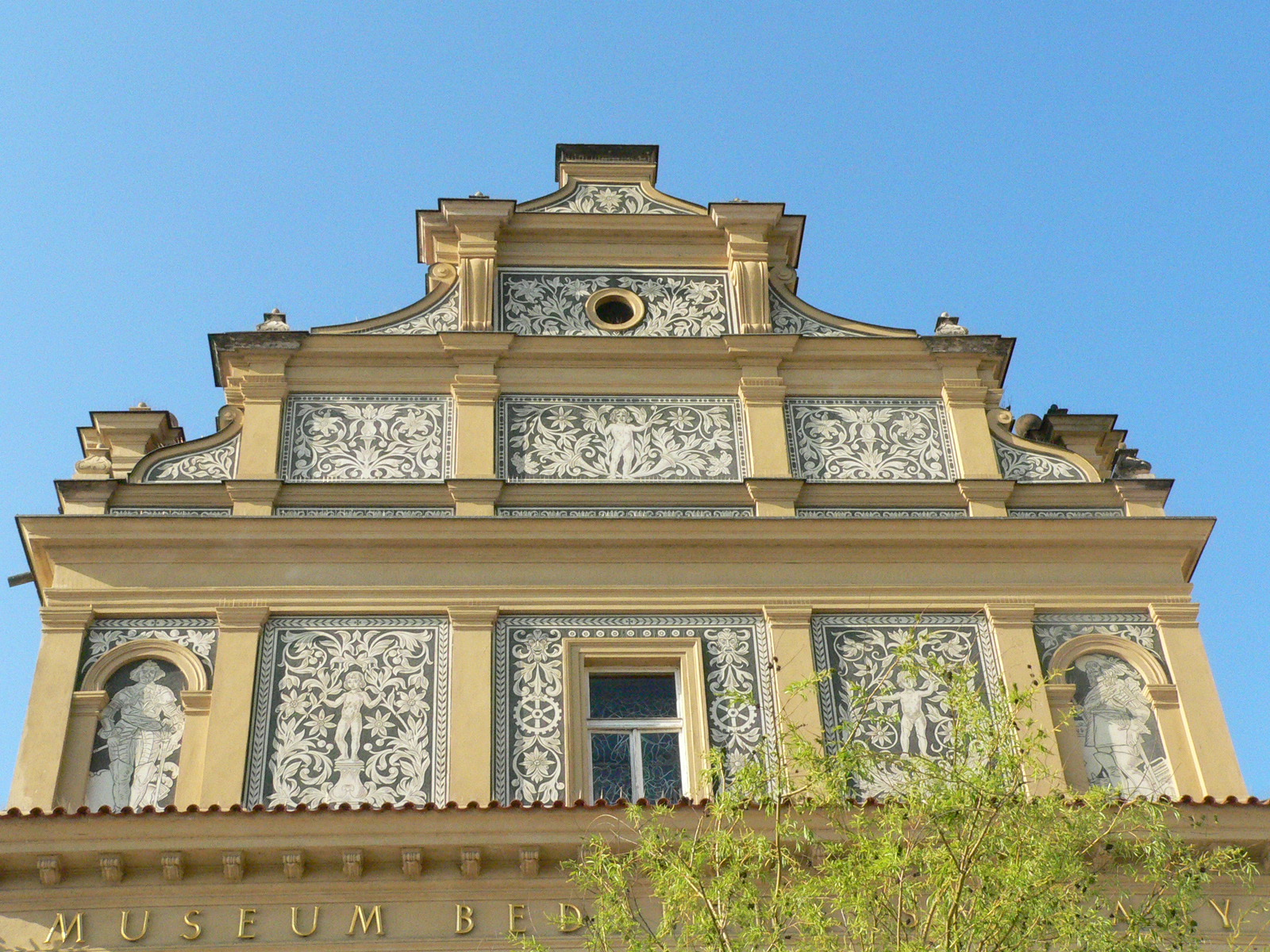 A Smetana Múzeum homlokzata, Prága